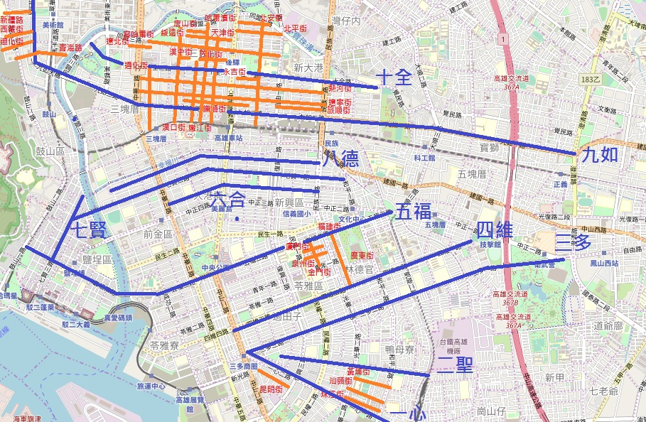 高雄市以中國地名命名的道路概圖